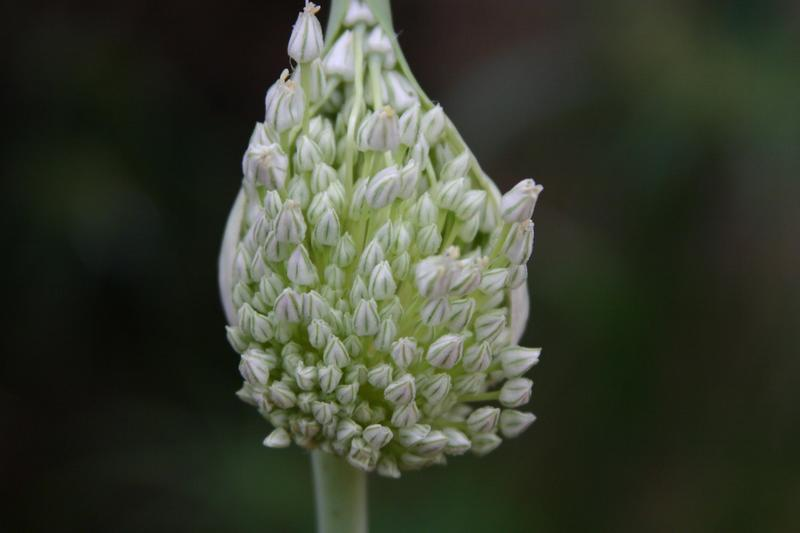 Elephant Garlic (Allium ampeloprasum)